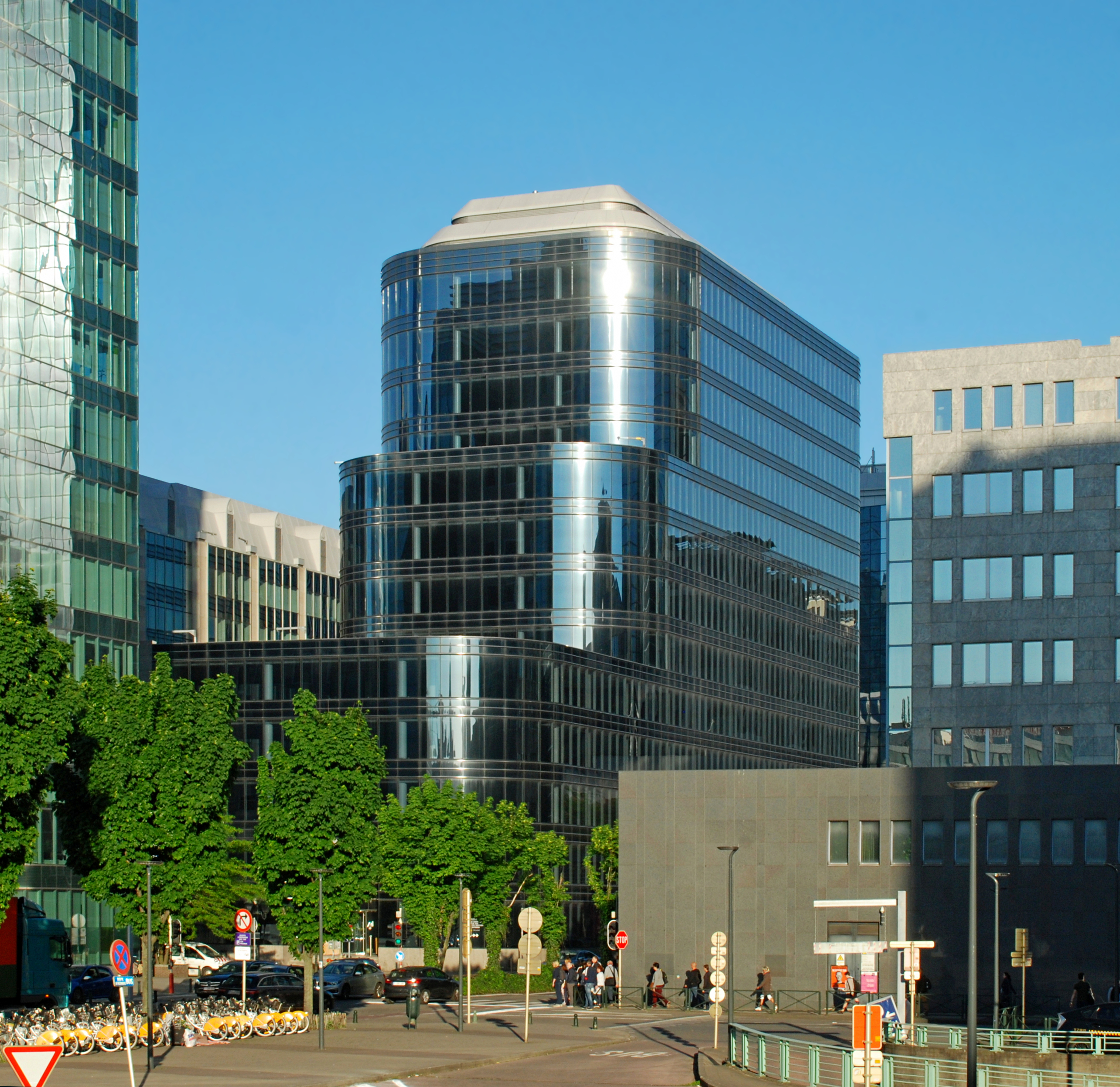 Belgique - Bruxelles - Boreal building (Postmodernisme, architecte Michel Jaspers, 1998)